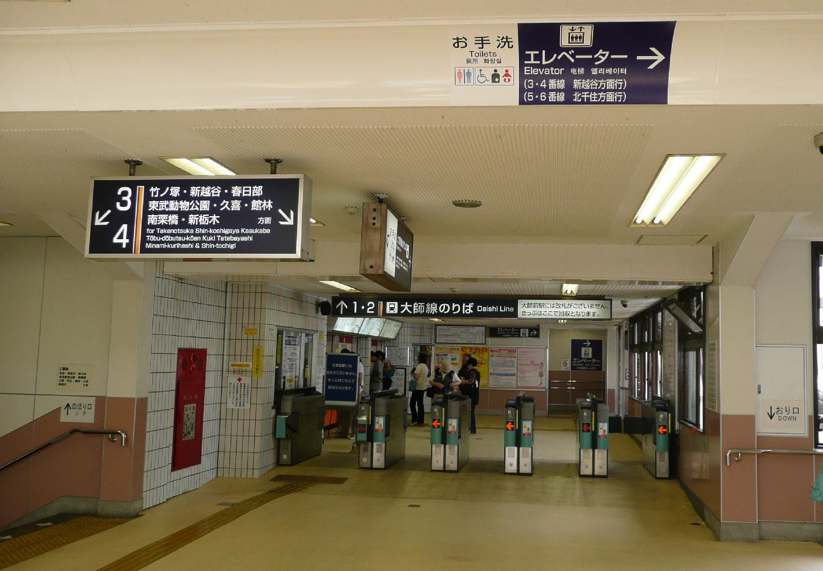 西新井駅大師線連絡口